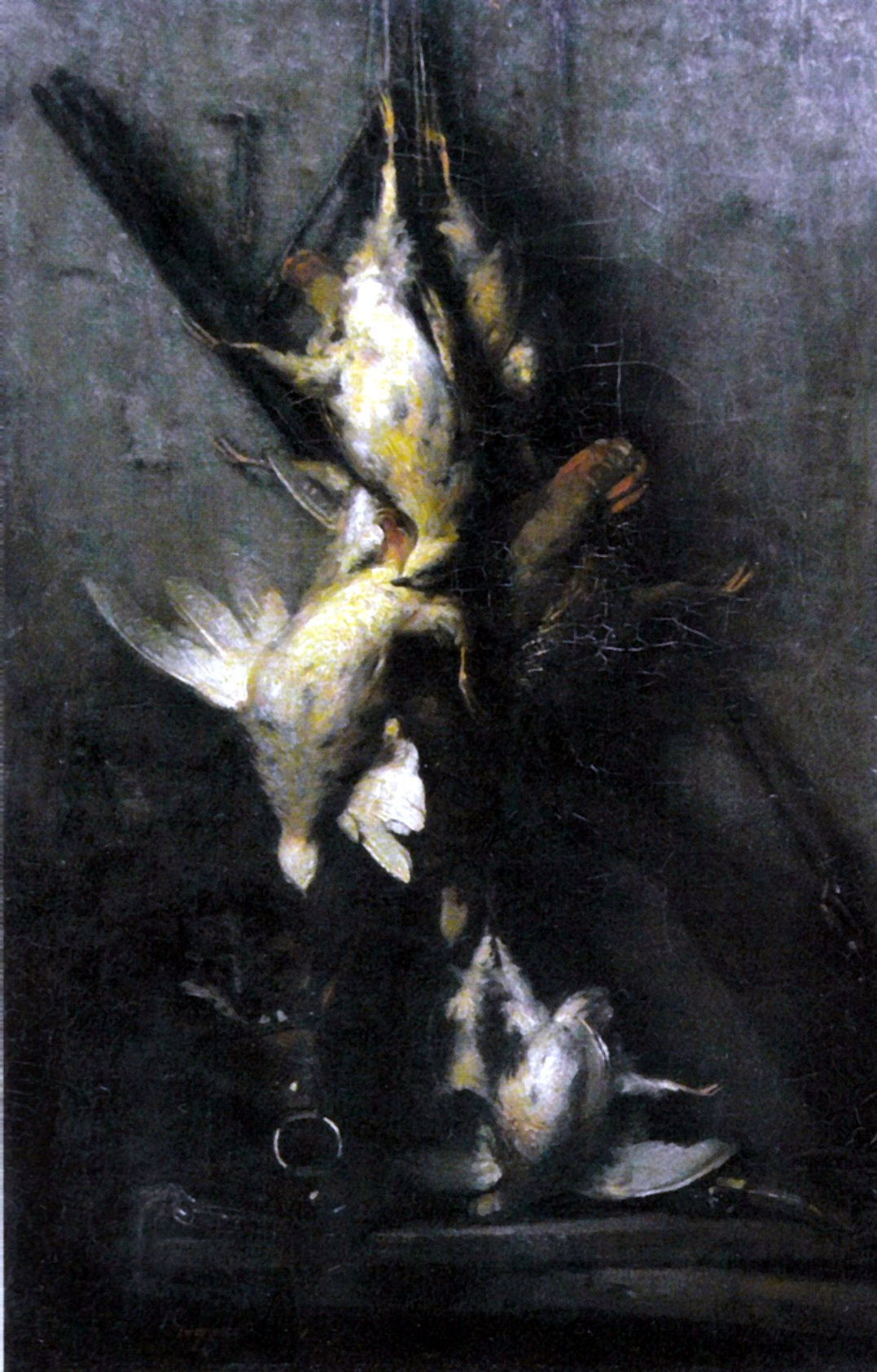 Potârnichi și prepelițe - Muzeul Național de Artă al României